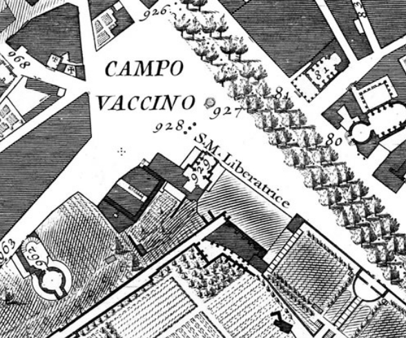 Pianta di Nolli